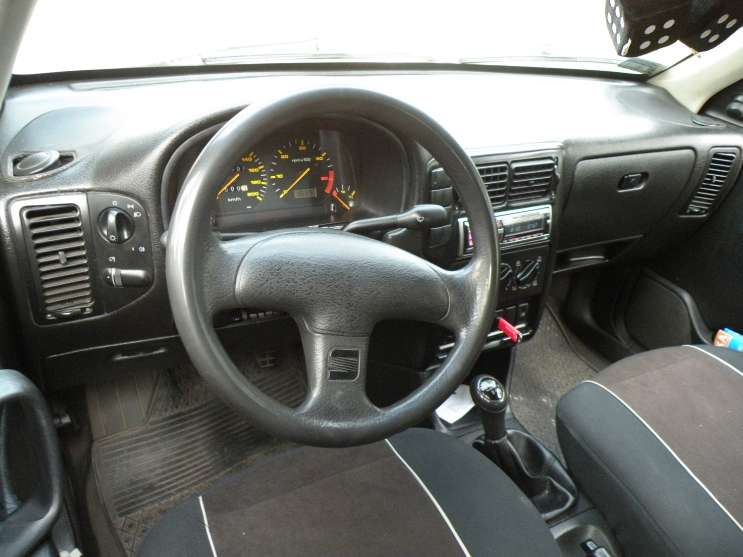 SEAT Ibiza Mk2 pre-facelift interior